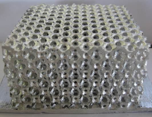 Bloc Mousses réalisé par Alvéotec